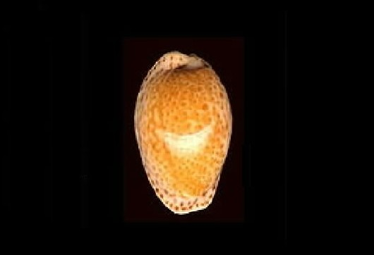 Cypraea spurca acicularis del Archipiélago Los Roques, Dependencias Federales - Venezuela.